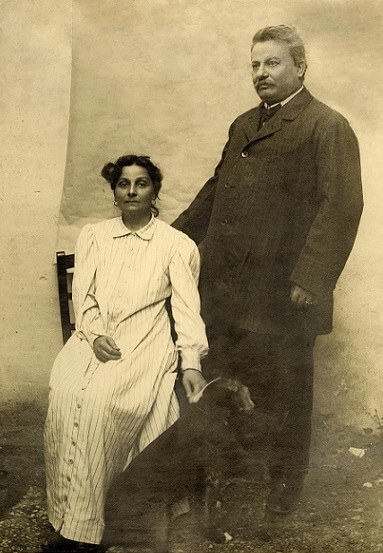 Mariù e Giovanni Pascoli con il cane Gulì